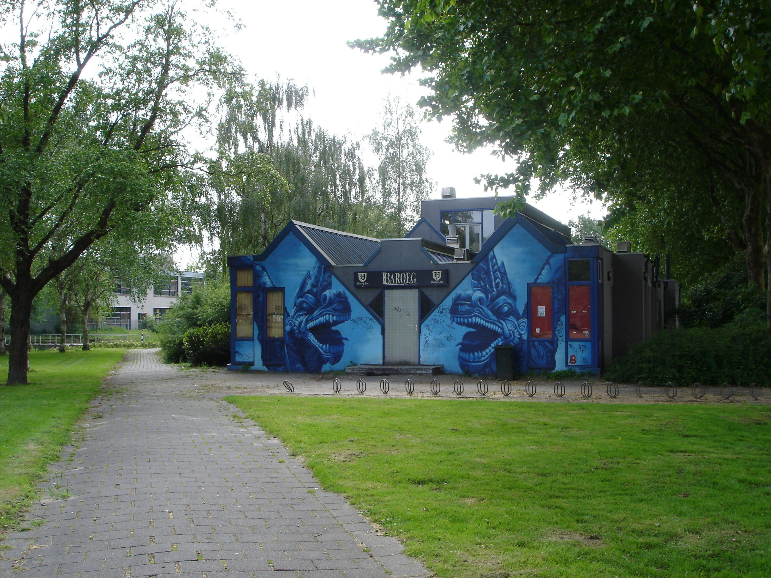 The Baroeg 'subcultureel poppodium' in Lombardijen, Rotterdam, The Netherlands